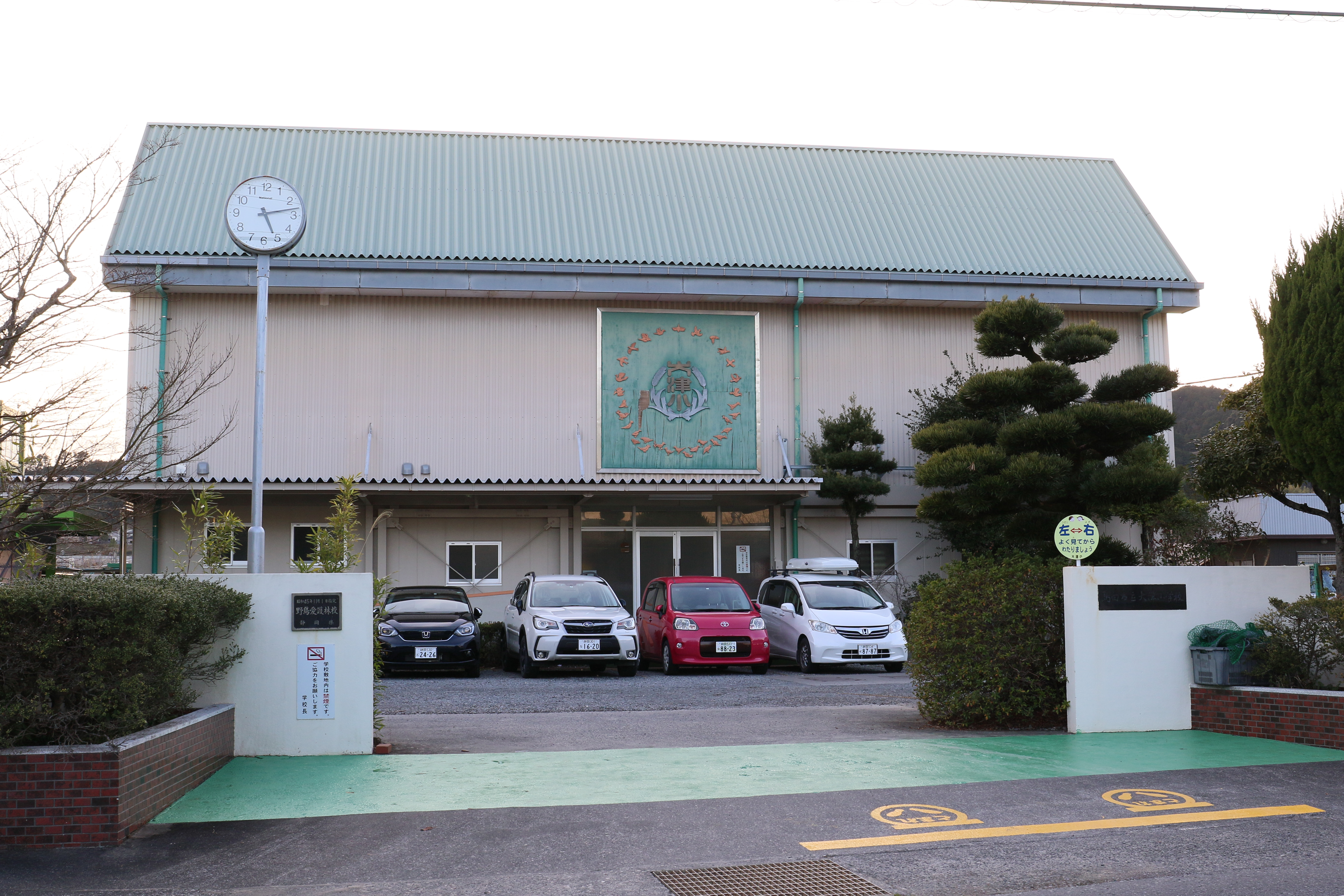 島田市立大津小学校の校門と体育館を撮影した。